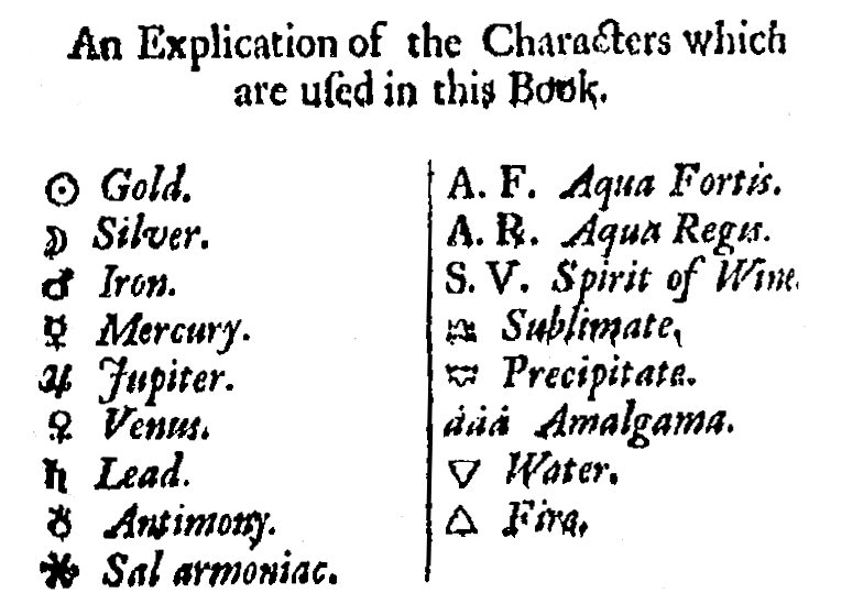 מקרא סמלים אלכימיים, מתוך ספר אנגלי מהמאה ה-17